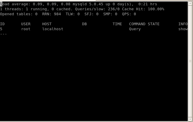 Toma de Pantalla de software mtop